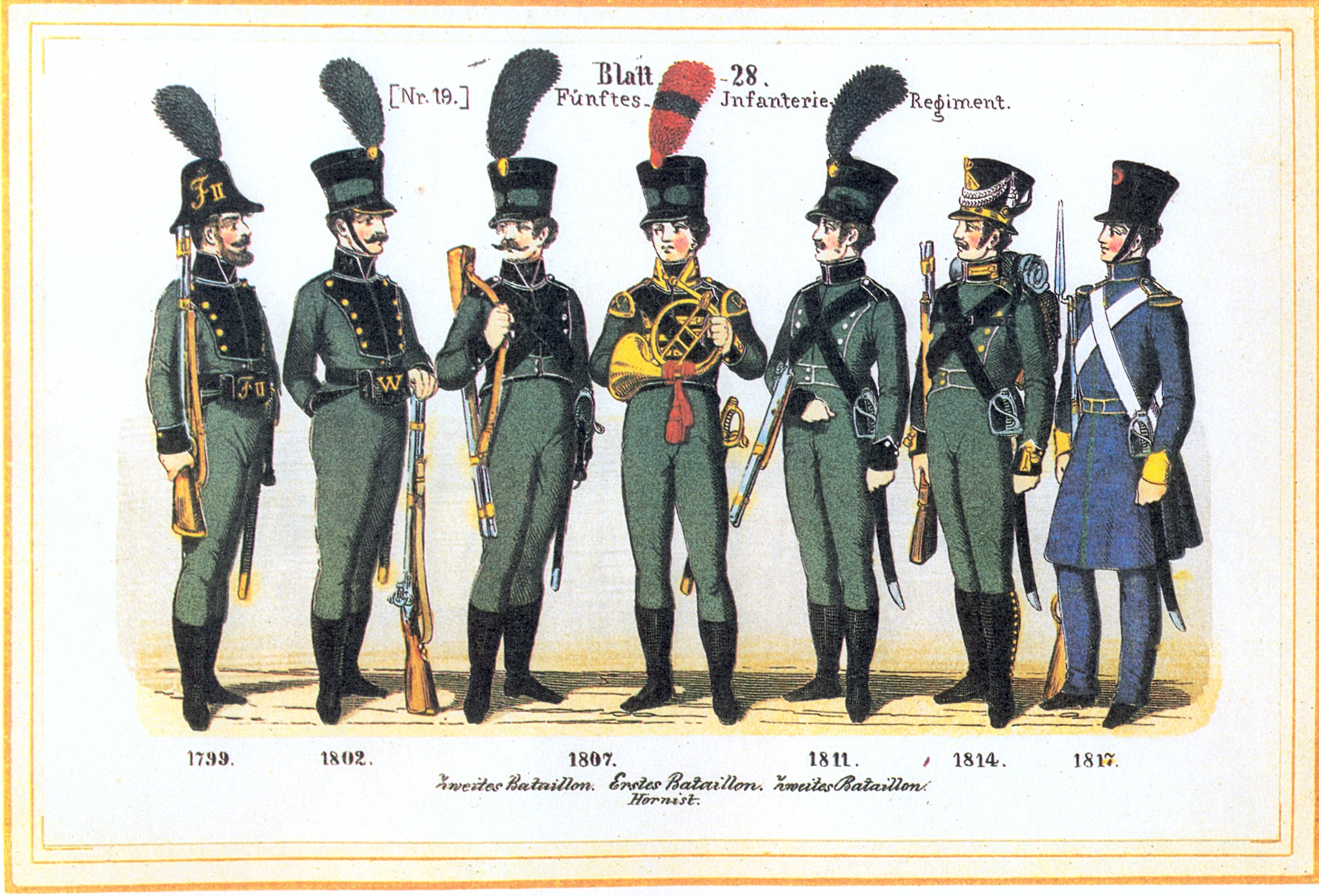 Blatt 28: 5. Infanterie-Regiment